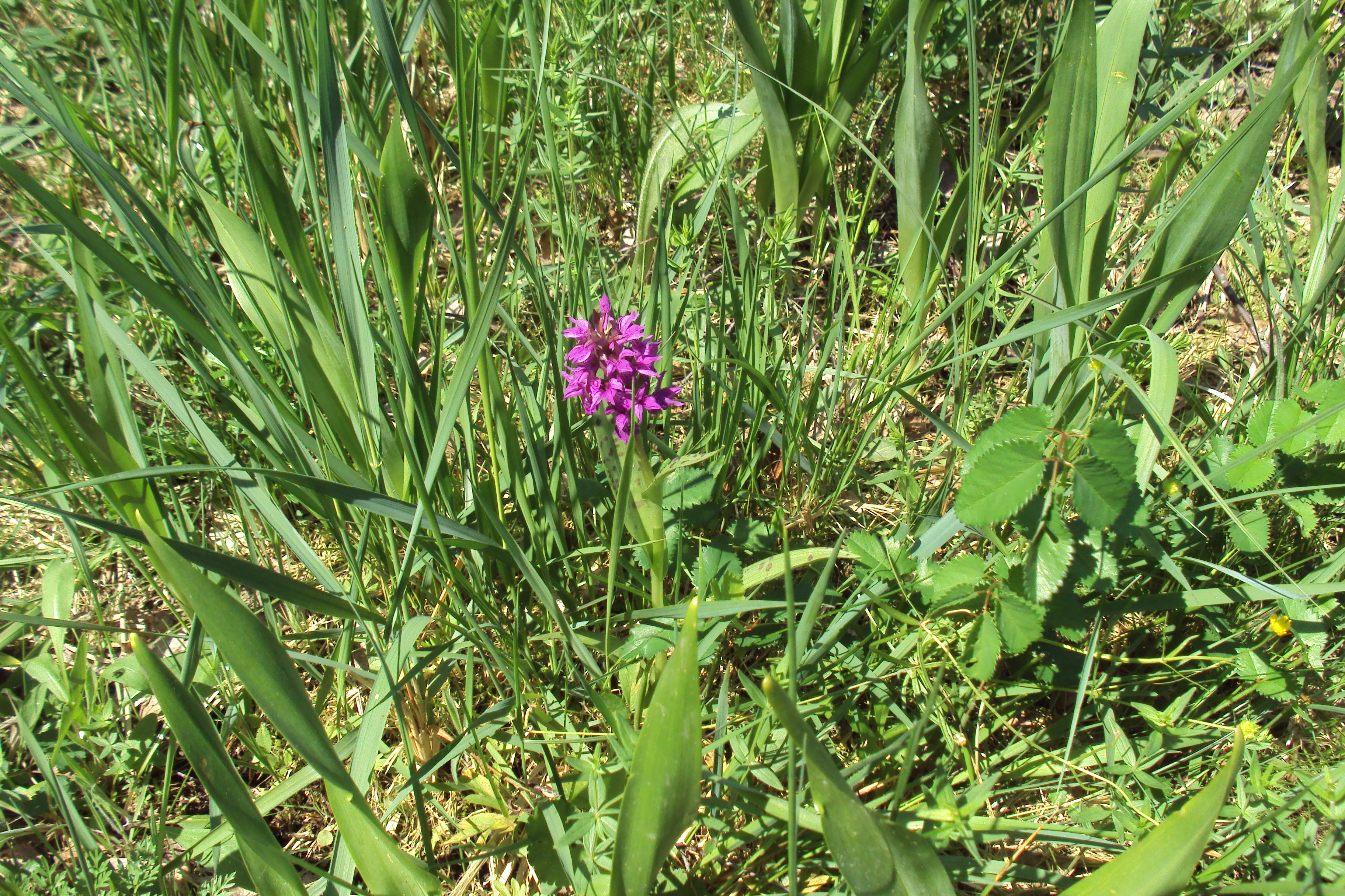 Přírodní památka Okřešické louky, detail